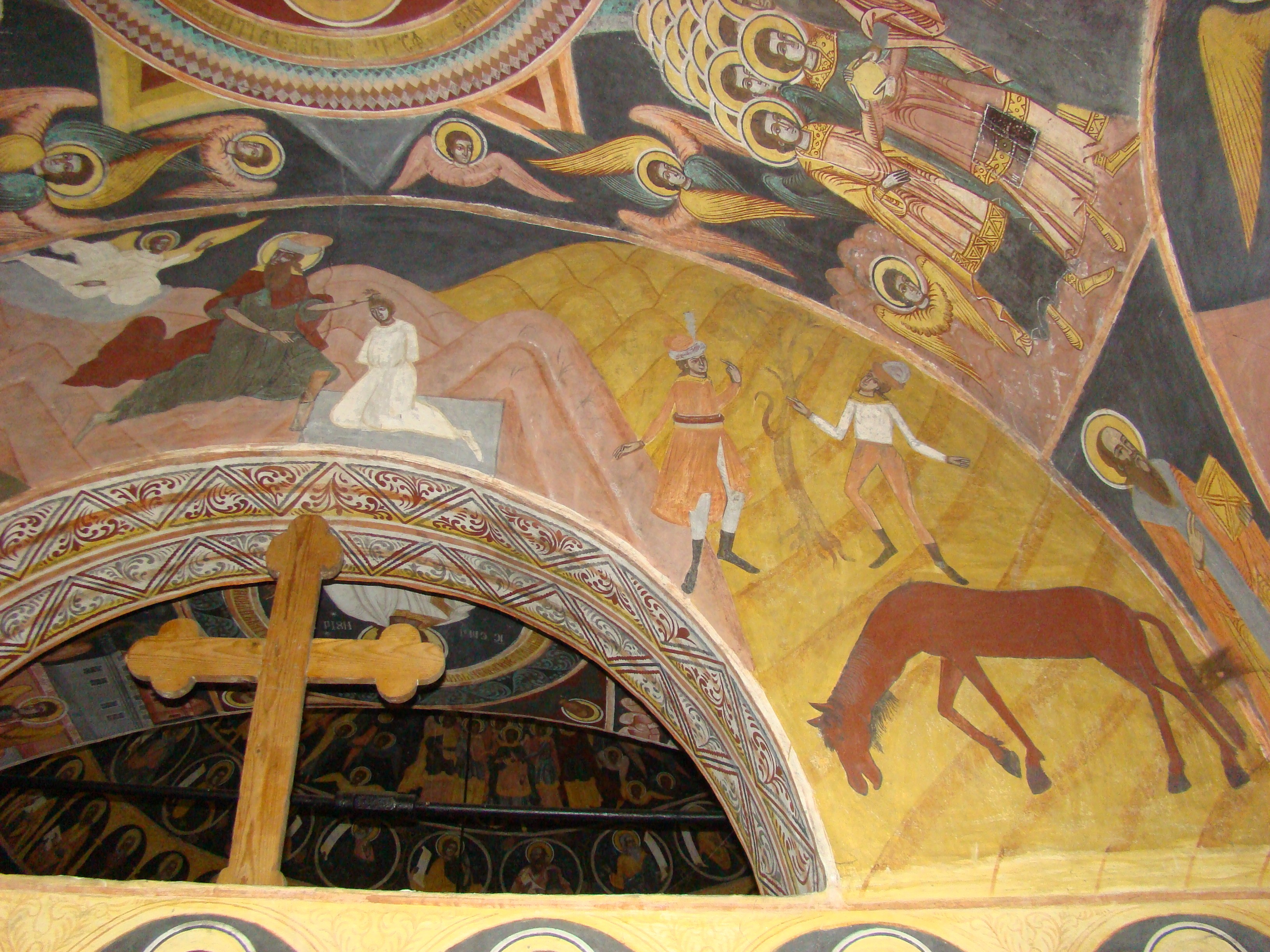 Biserica "Naşterea Domnului" , sat SĂRATA; comuna PORUMBACU DE JOS